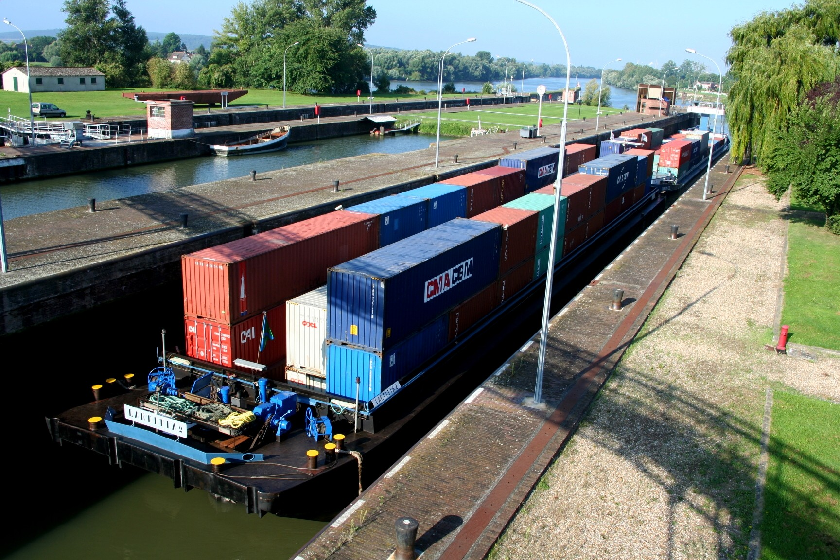 écluse sur la Seine, commune d'Amfreville-sous-les-Monts - Eure, France